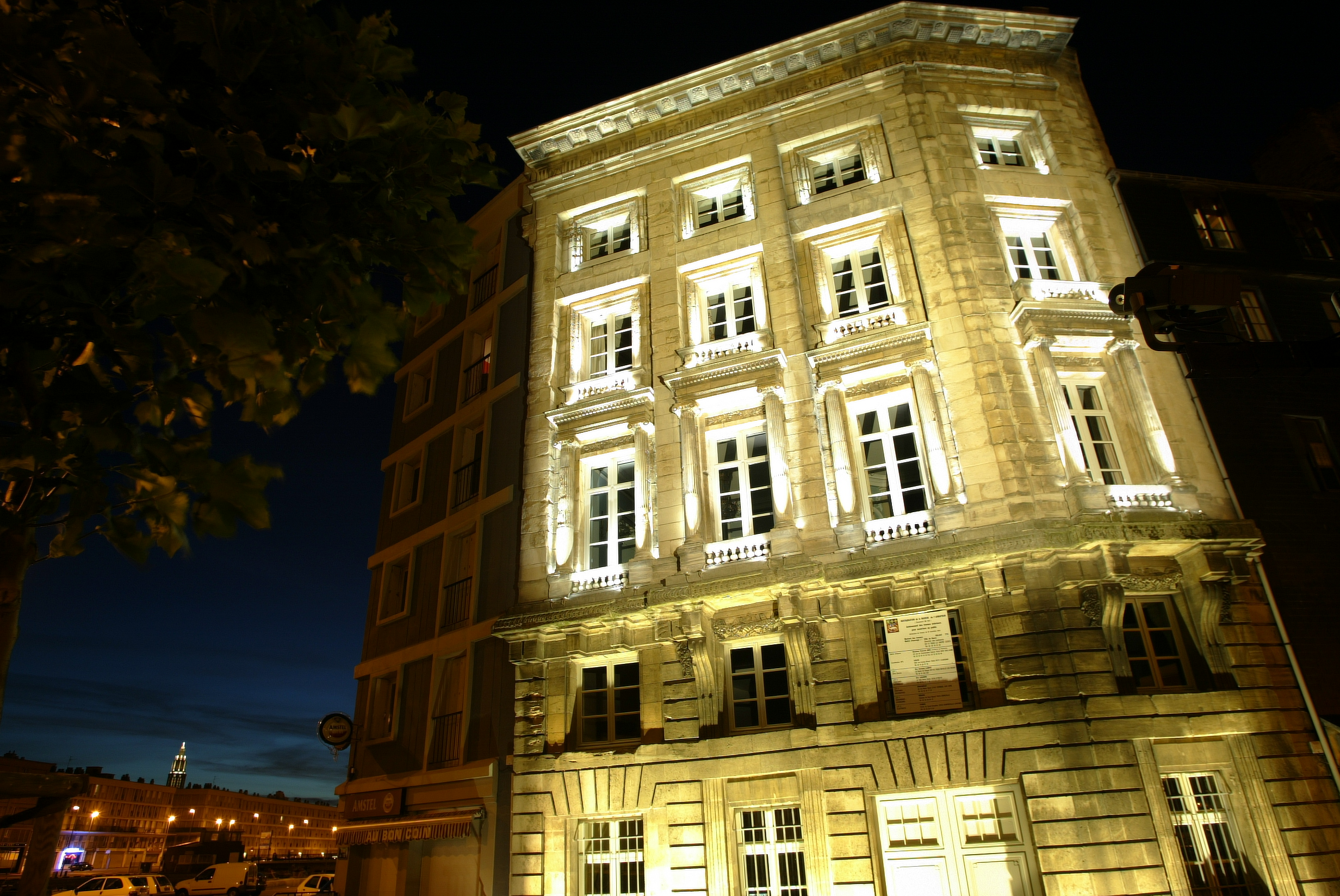 La façade de la Maison de l'Armateur